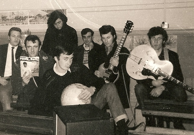 Electric Poets